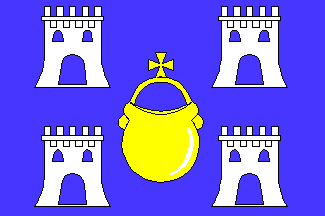 Bandera de Baralla, en Lugo (España)